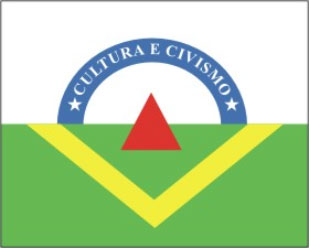 Bandeira da Cidade de Viçosa-MG